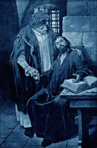 Česky: Věnceslav Černý - Kříšťan z Prachatic návštěvou mistra Jana Husi